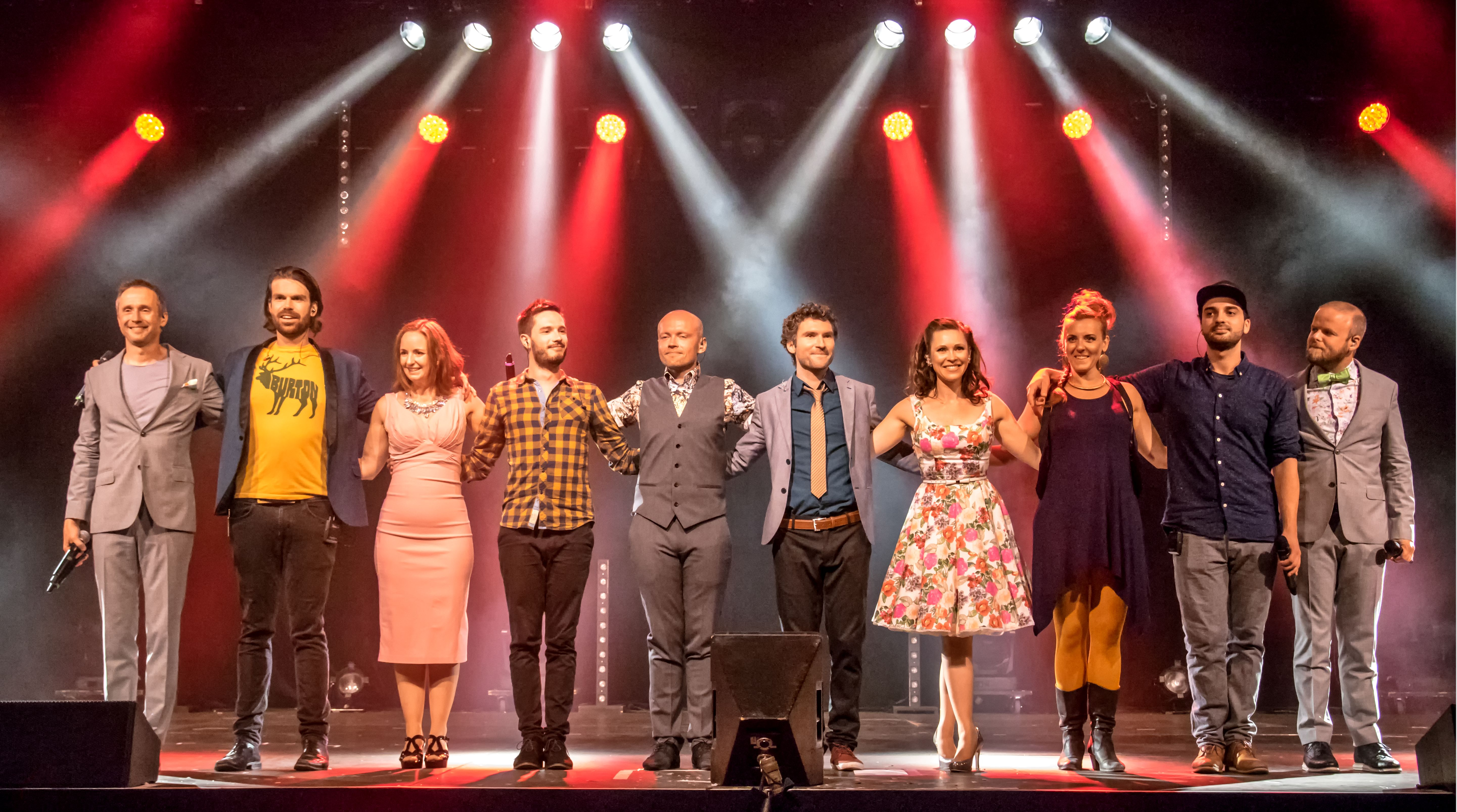 Bilder vom Zelt Musik Festival 2016 in Freiburg im Breisgau Der Schauspieler Bernd Lafrenz und der Musikverein Sölden "Sommernachtstraum"